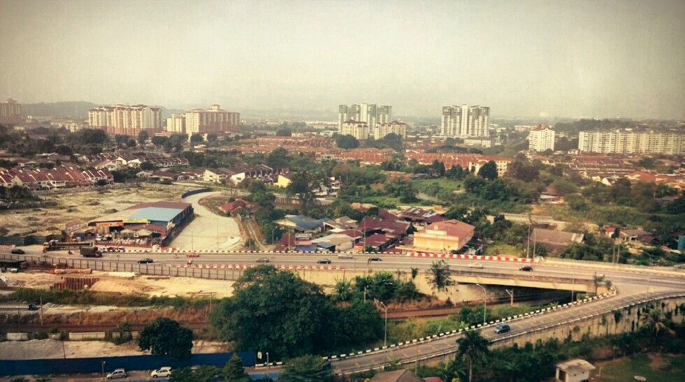 Kajang